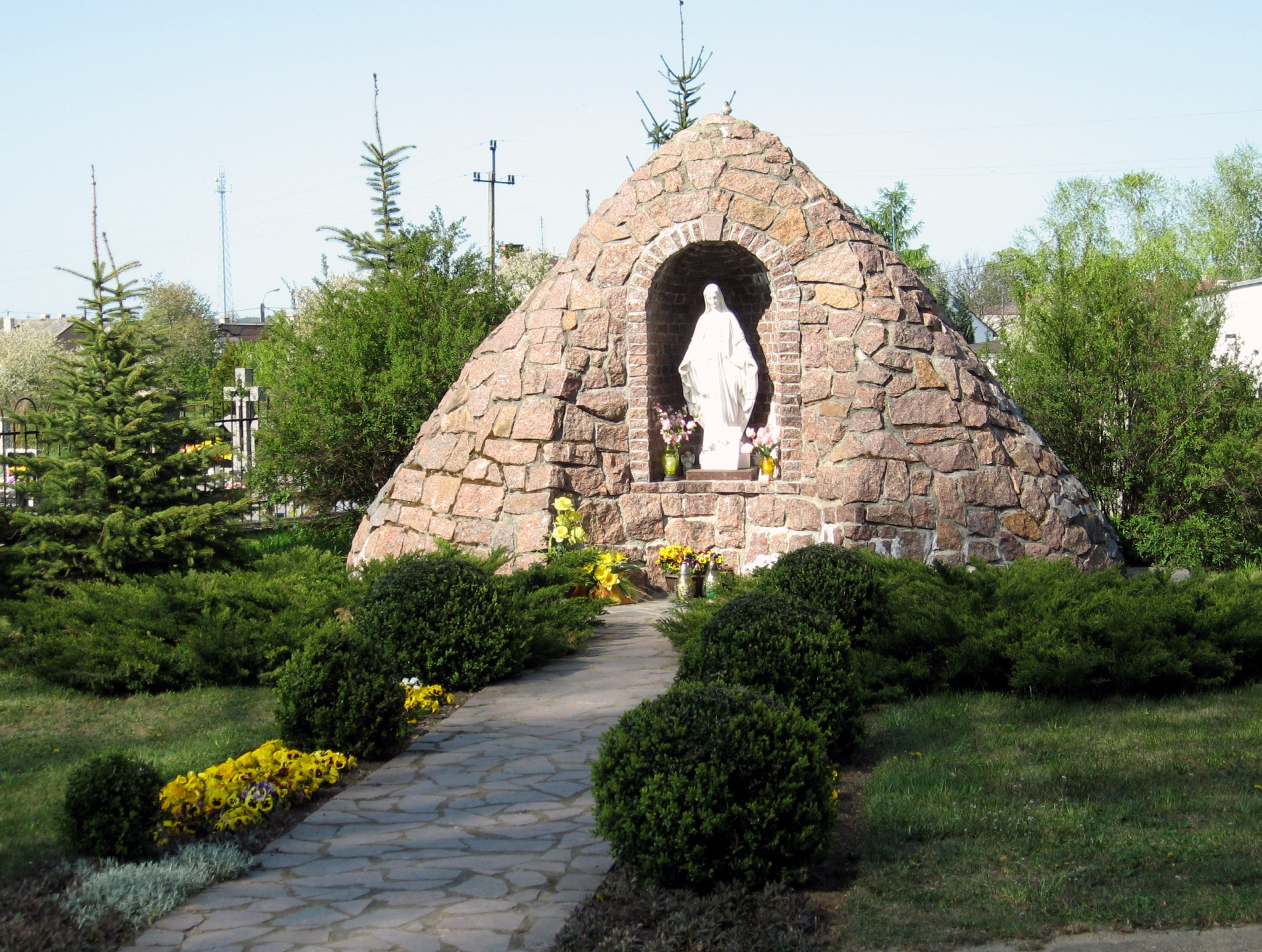 Kościół pw. MB Królowej Różańca Świętego w Iłowie, grota obok kościoła